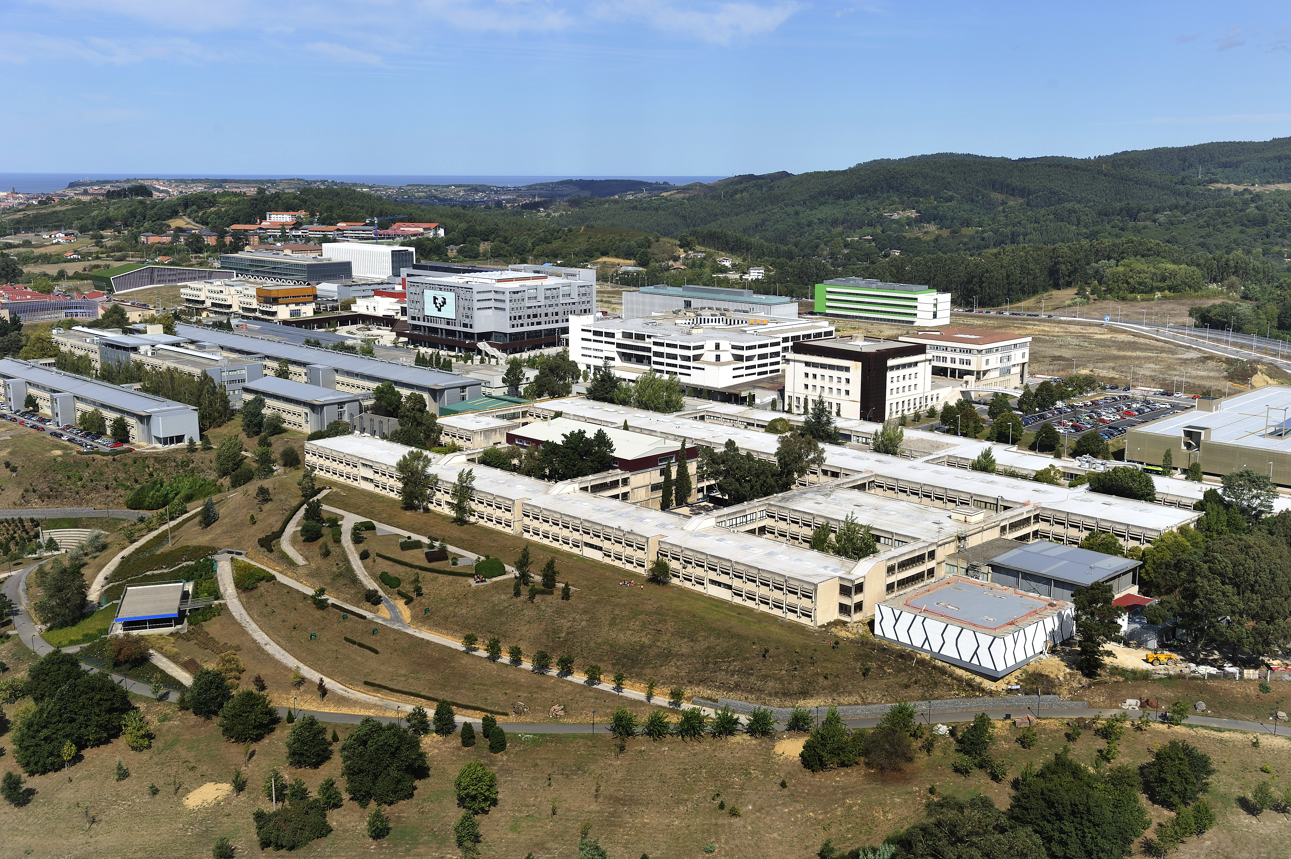 EHUren Bizkaiko Campuseko Leioako eraikinak